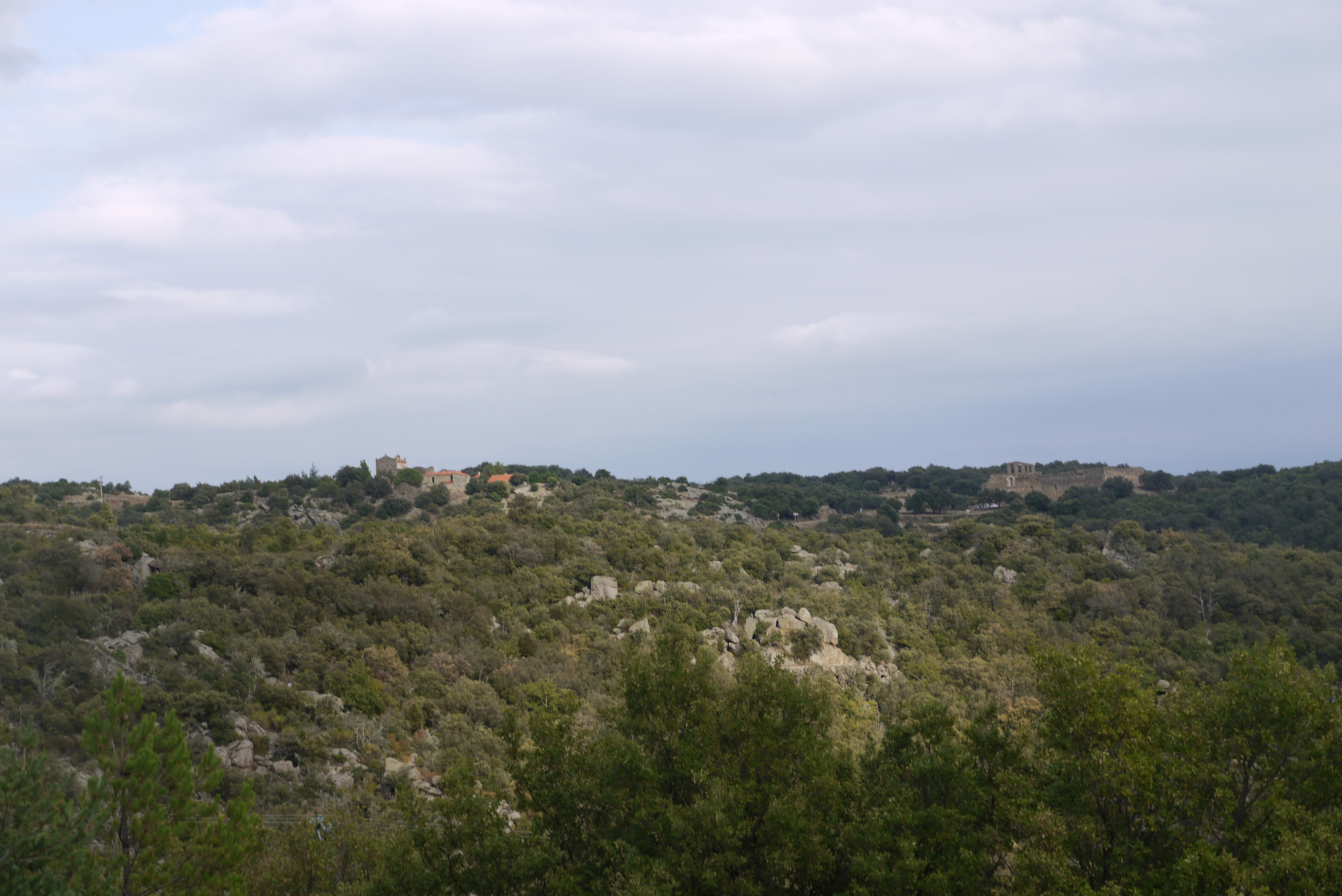 Vue de Marcevol depuis Arboussols.